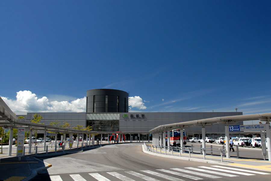 Hakodate Station, Hakodate, Hokkaido, Japan 日本北海道的門戶車站——函館車站